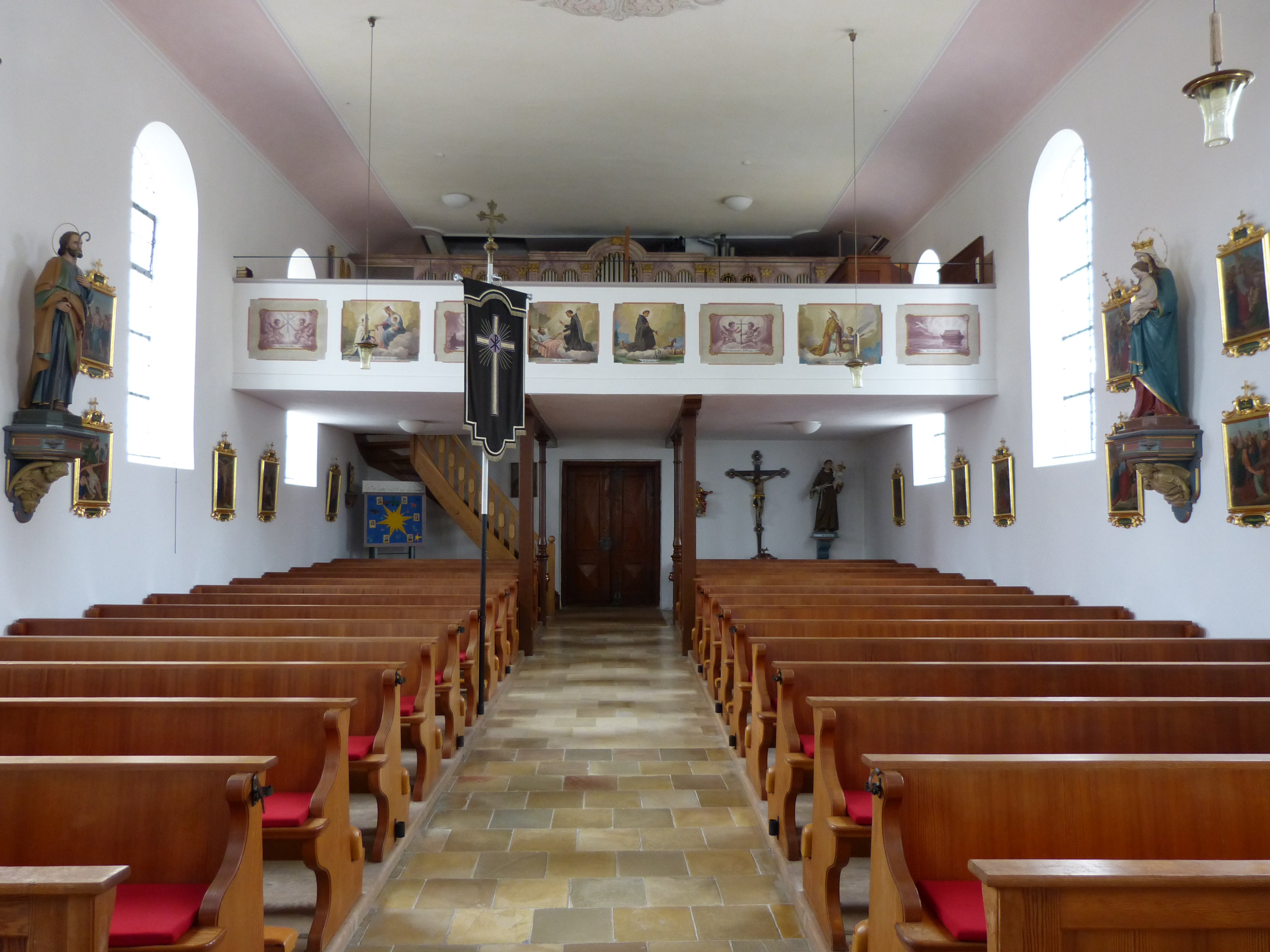 St. Stephanus, Köngetried, Landkreis Unterallgäu, Bayern